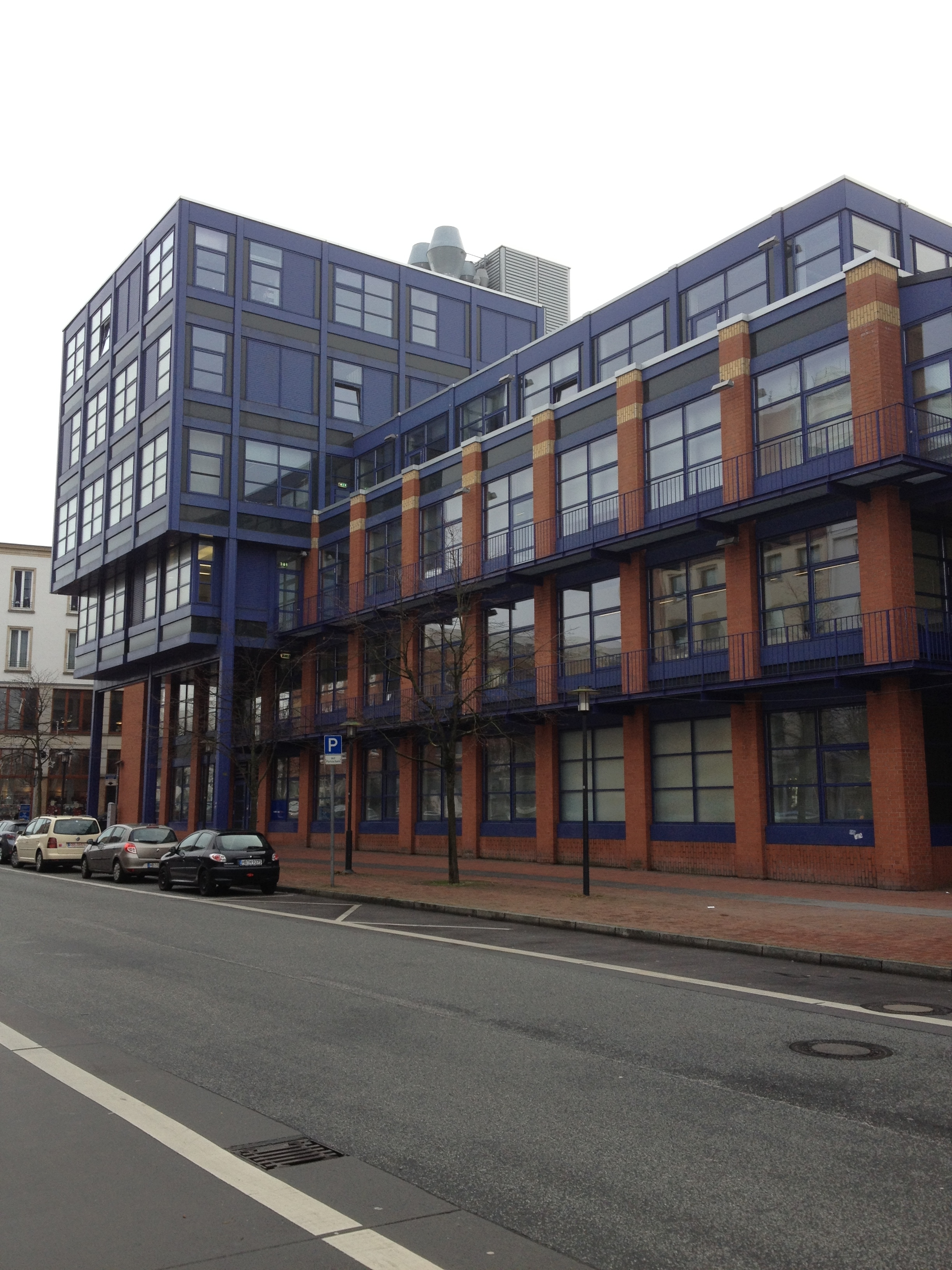 Gebäude Z der Hoschschule Bremerhaven